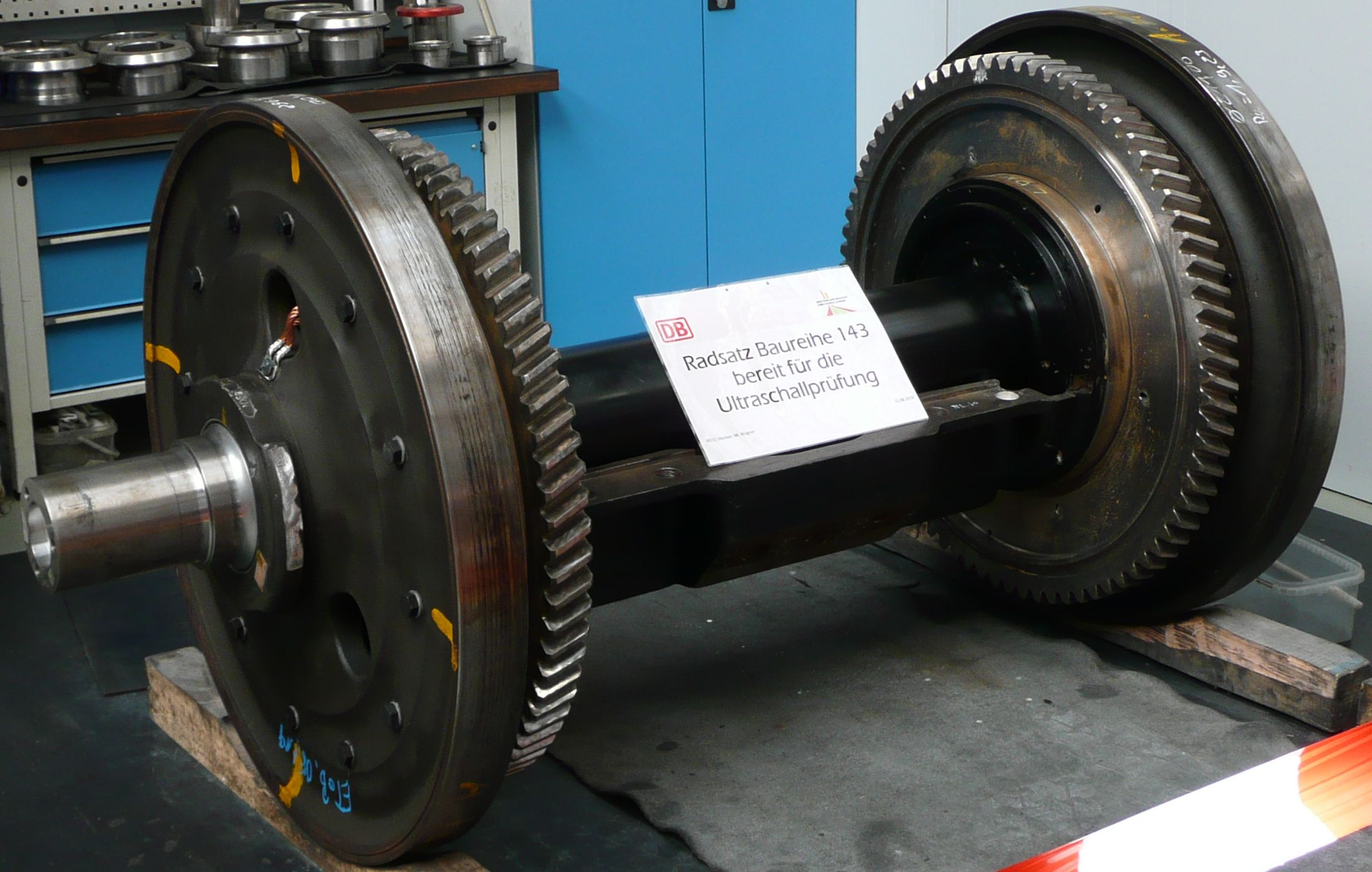 Radsatz der BR 143 zum Ultraschallprüfen in der Radsatzwerkstatt des AW Dessau